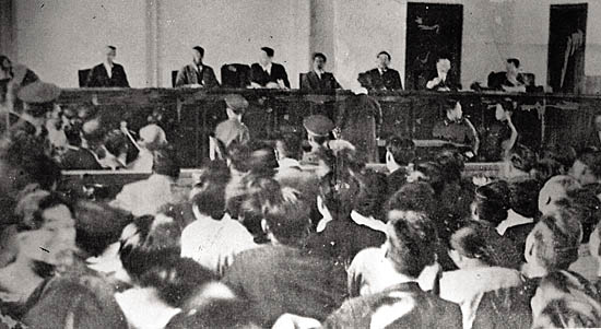 1949년 반민특위 재판 광경.